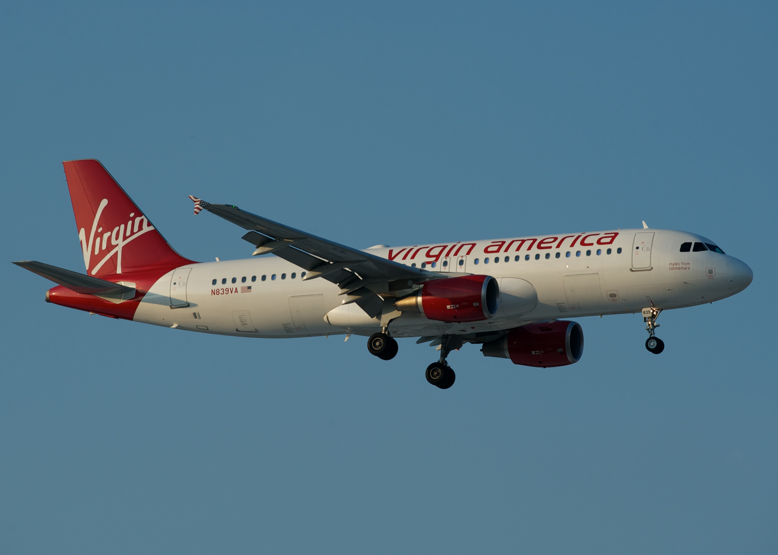 Landing Runway 14R, ORD